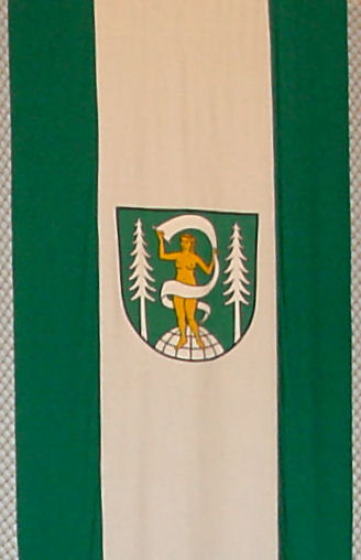 Offizielle Farben und Wappen der Gemeinde Böhlen